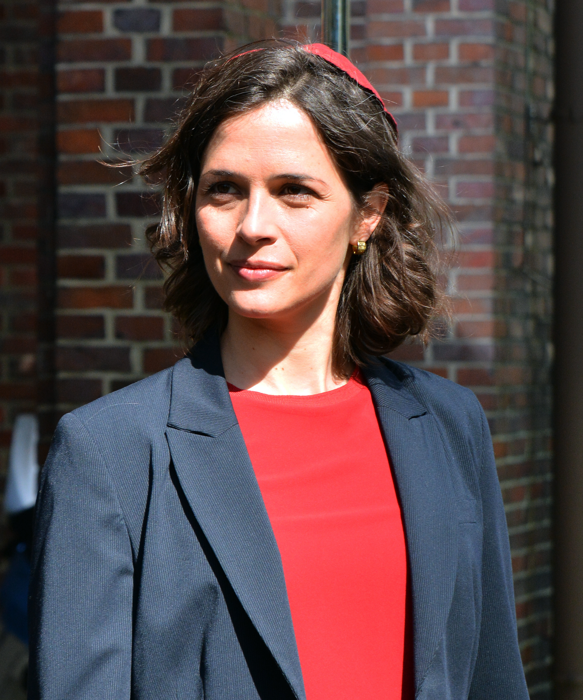 Catherine De Léan Schauspielerin, bei einen Fototermin der Komödie Simon sagt auf Wiedersehen zu seiner Vorhaut